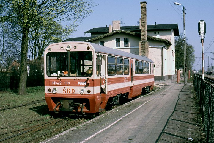 Wagon motorowy MBxd2-213 na stacji Stare Bojanowo